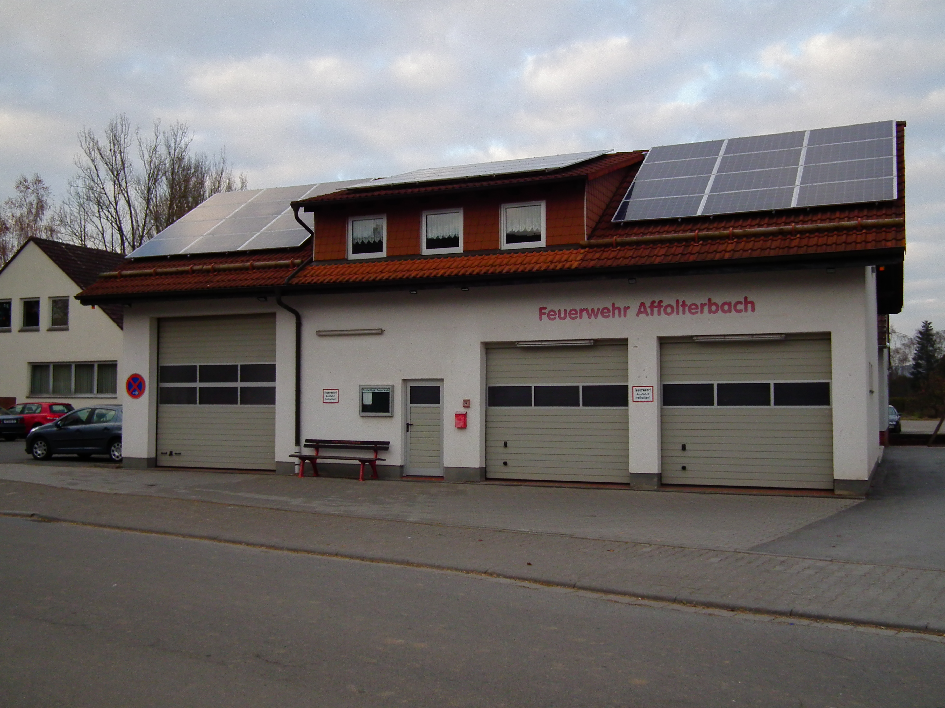 Feuerwehr in Affolterbach (Wald-Michelbach, Hessen, Deutschland)